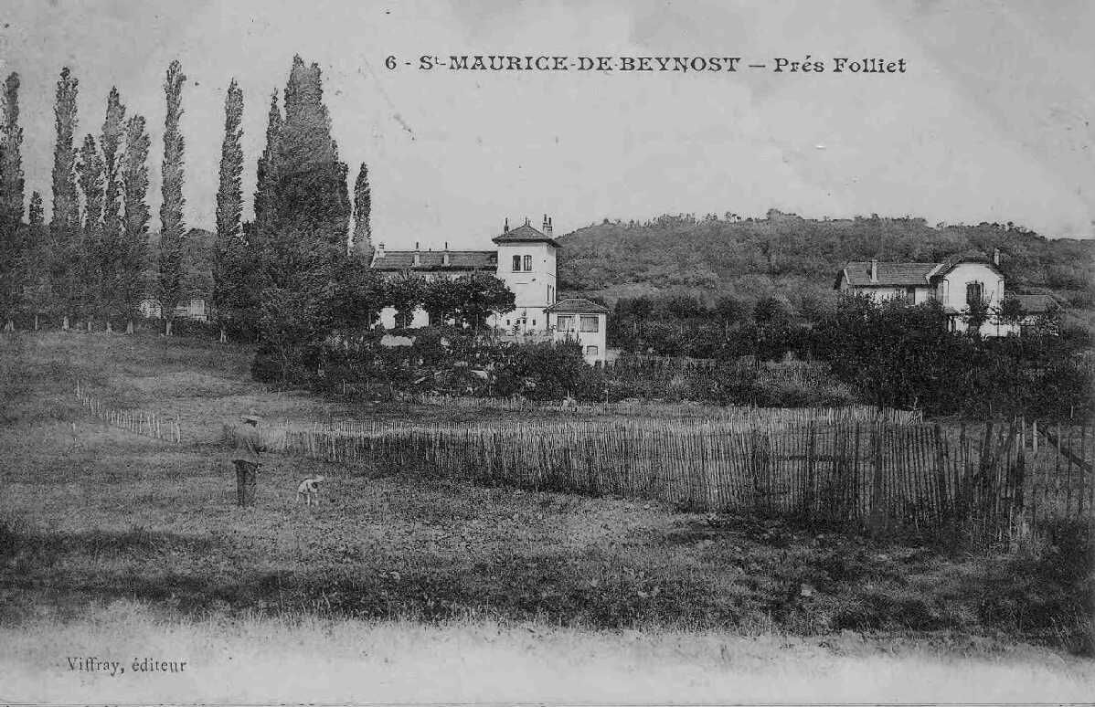 Pré Folliet Saint-Maurice-de-Beynost - carte postale ancienne. Sur ce pré sera par la suite construite la cité des Folliets.